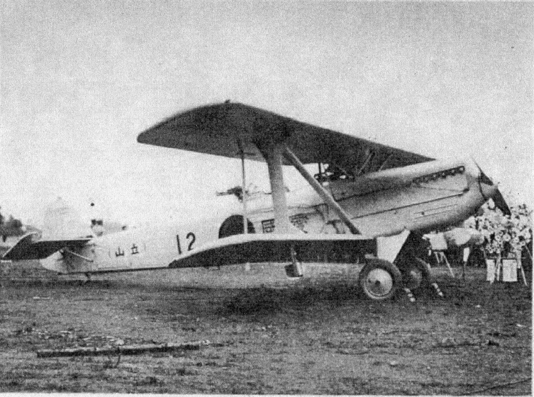 説明文に「今回満洲上海事変に際し、我が九千万県民の熱烈なる愛国の結昌（ﾏﾏ）として陸軍省に献納したる立山号の浜黒崎飛行場へ着陸せし雄姿。 昭和七年四月」とあり。